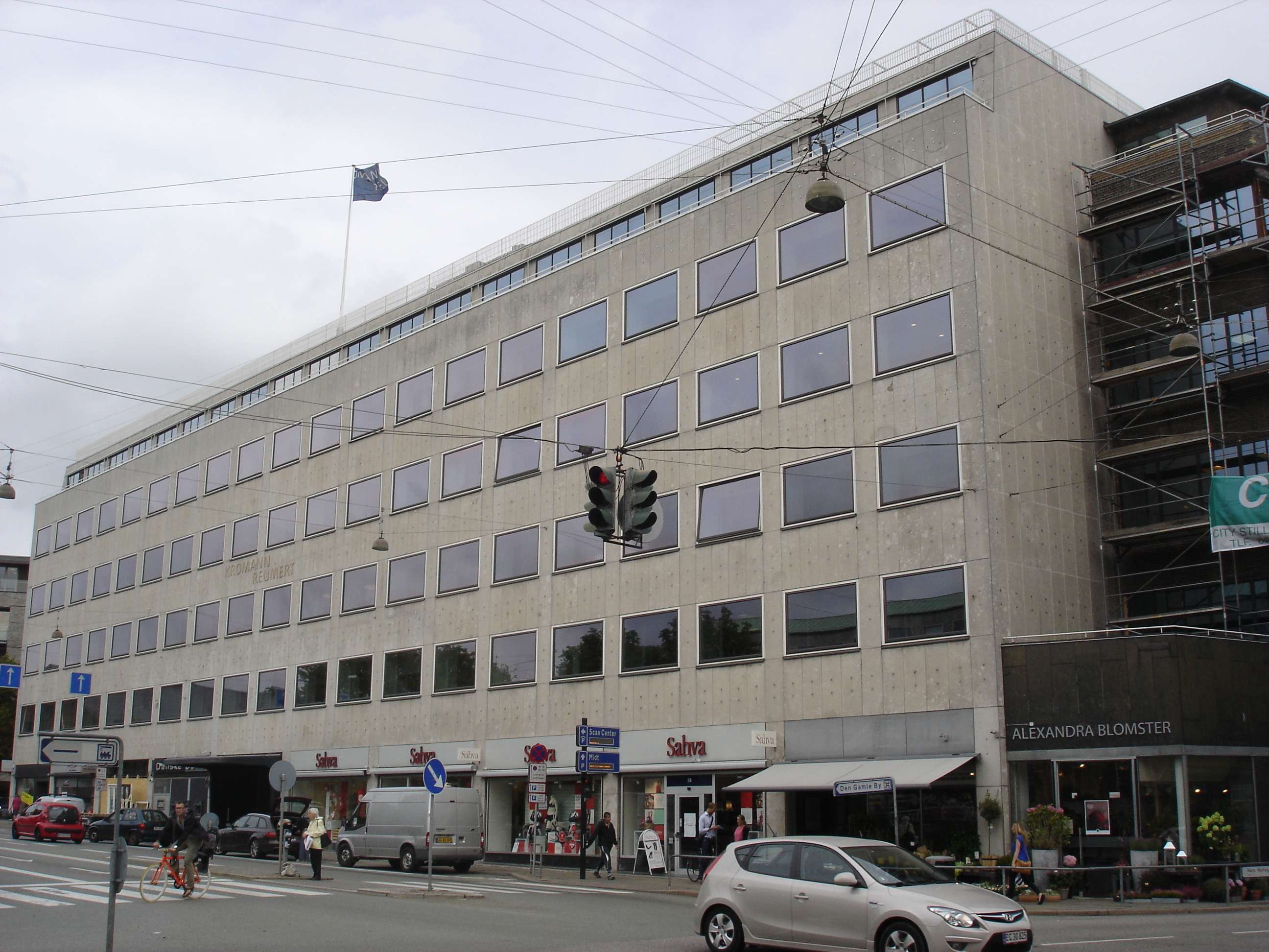 Handelsbankens filial i Aarhus fra 1944